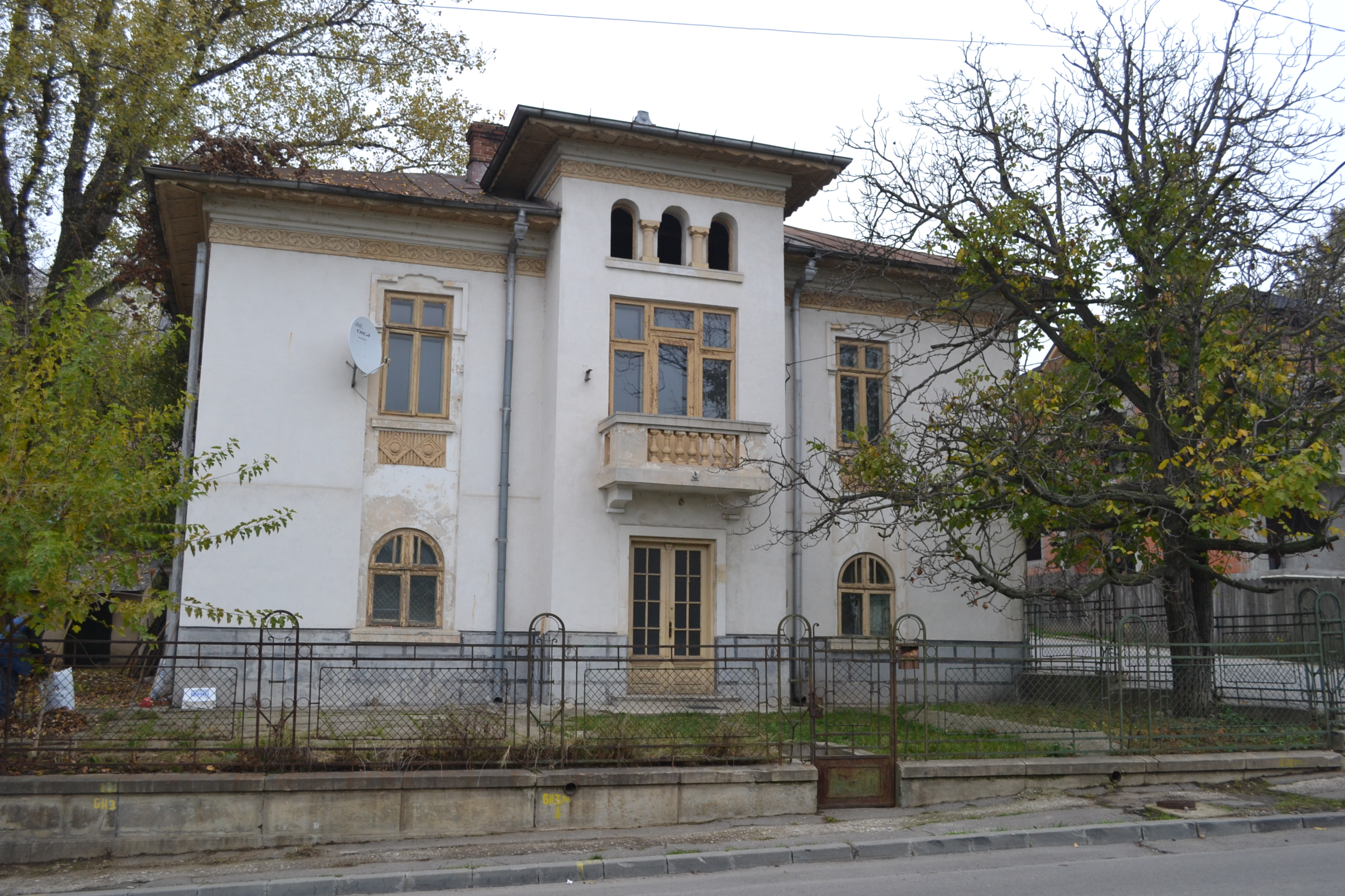 Casă din strada Vederii 3, Slatina din 2014.